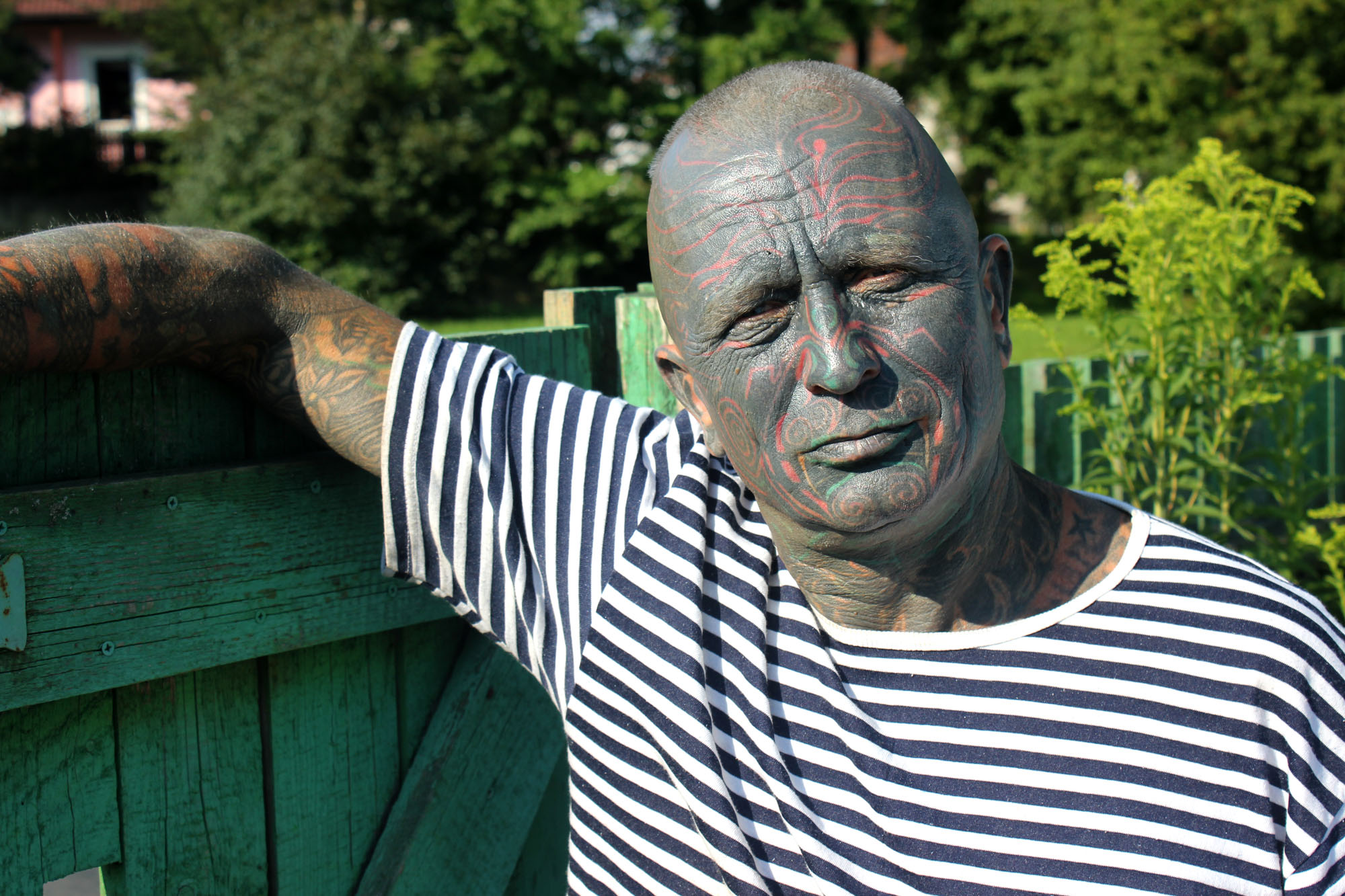 prof. JUDr. Vladimír Franz